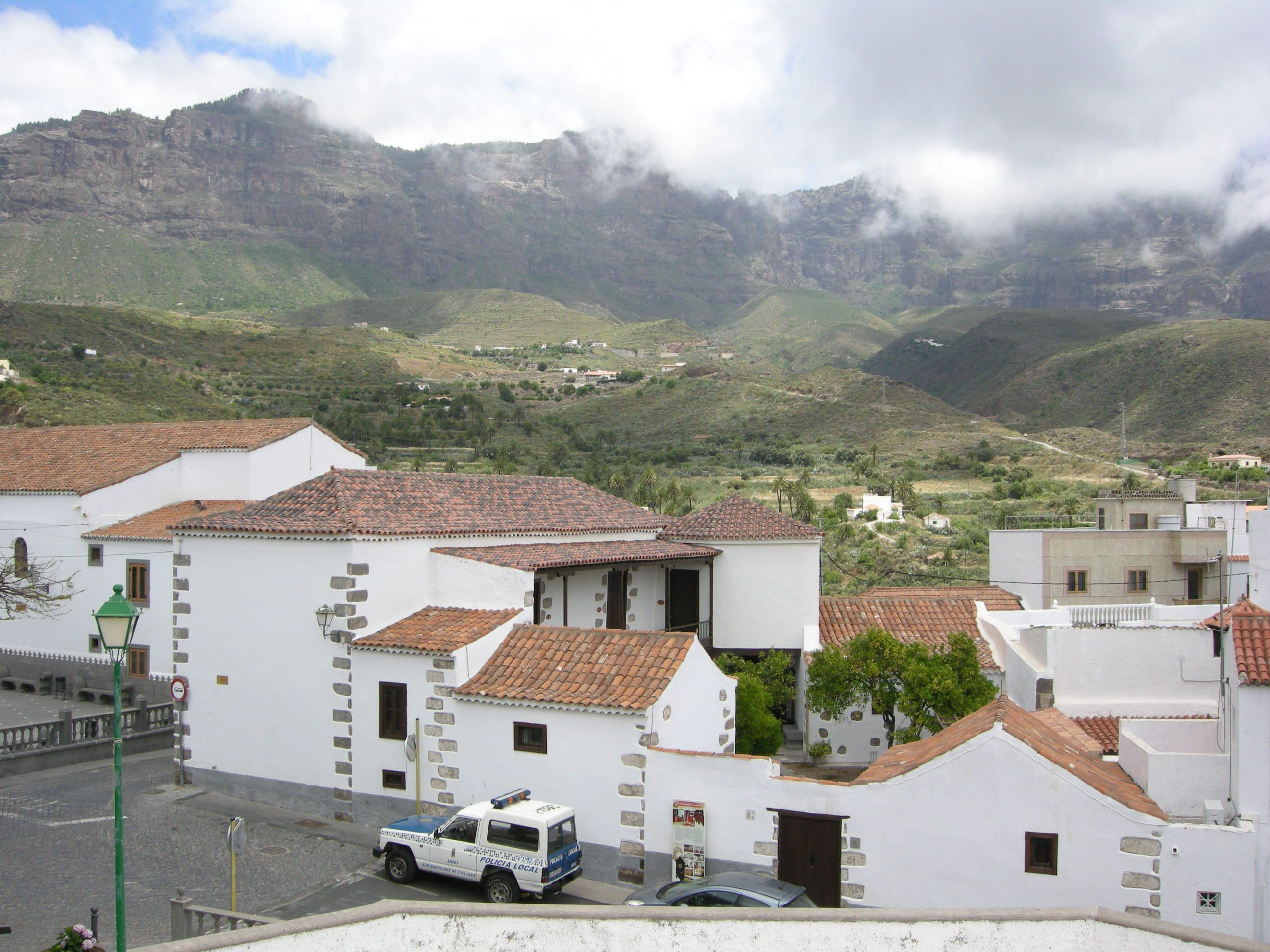 San bartolomé de Tirajana